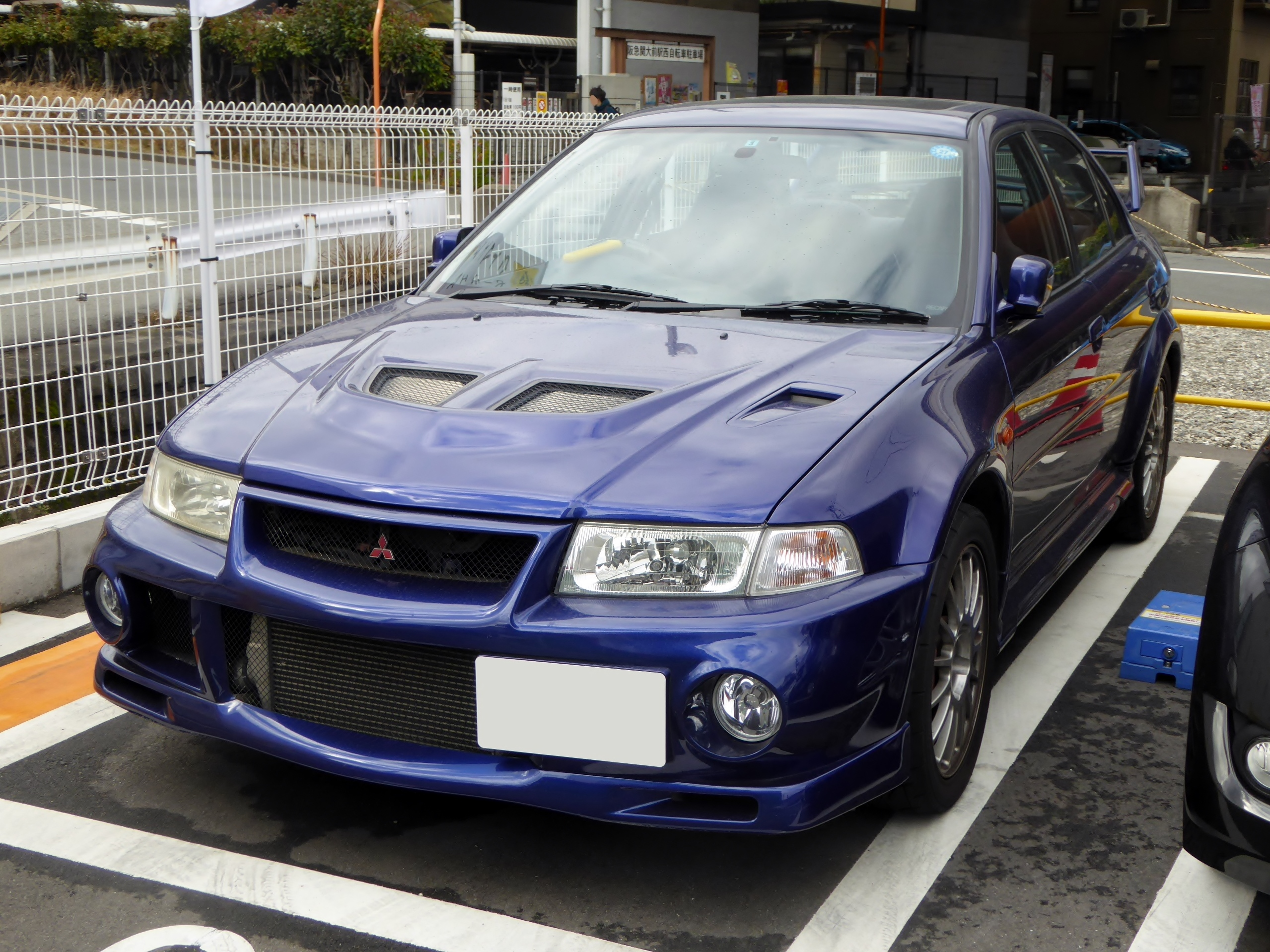 三菱・ランサーGSRエボリューションVIをフロントから撮影。